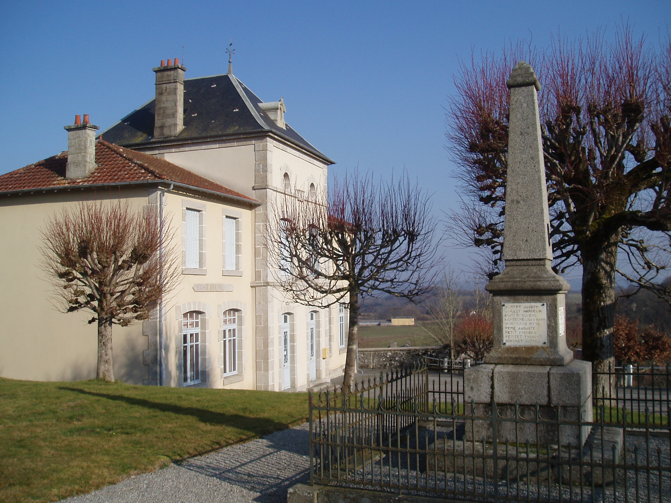 Chamberaud mairie et monument aux morts